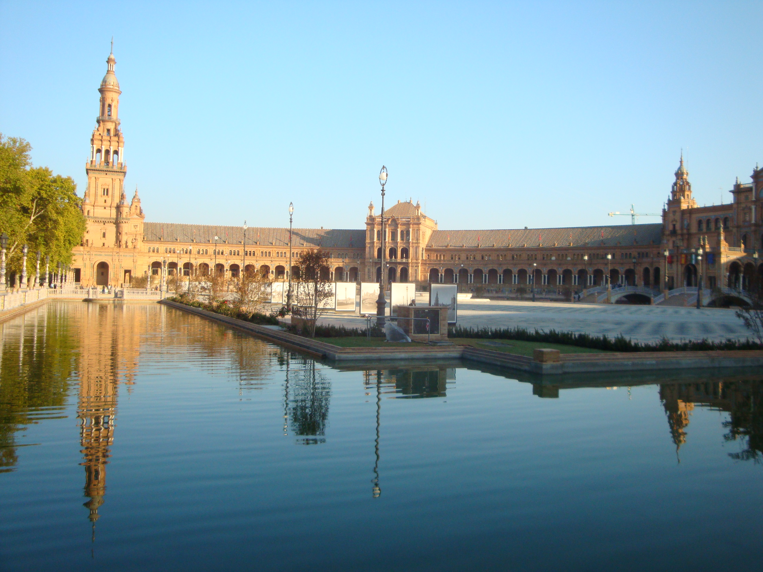 Plaza España de Sevilla (restaurada en 2010)